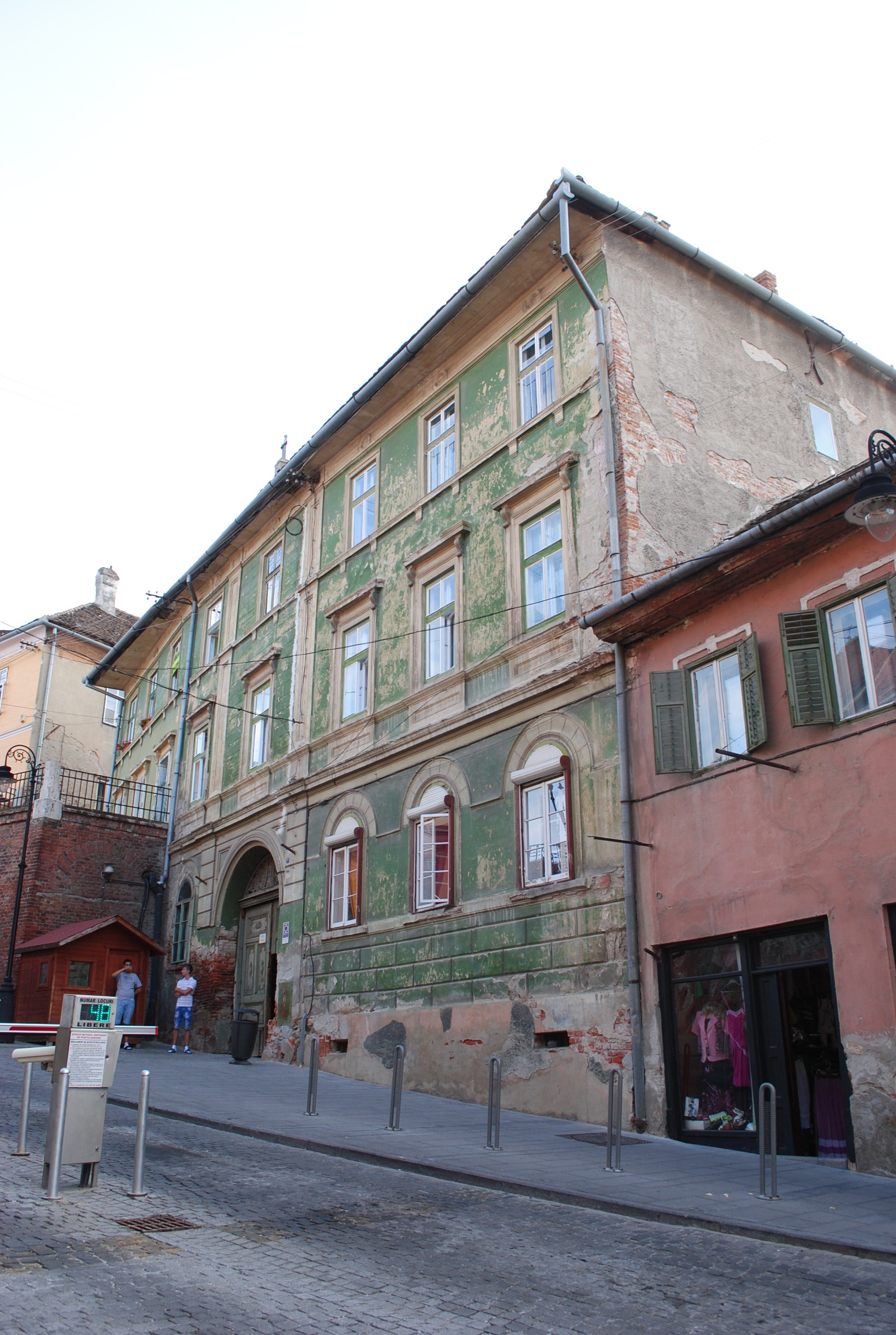 Casă, sec. XV - prima jum. sec. XVI, sec. XVIII; ultimul sfert al sec. XIX